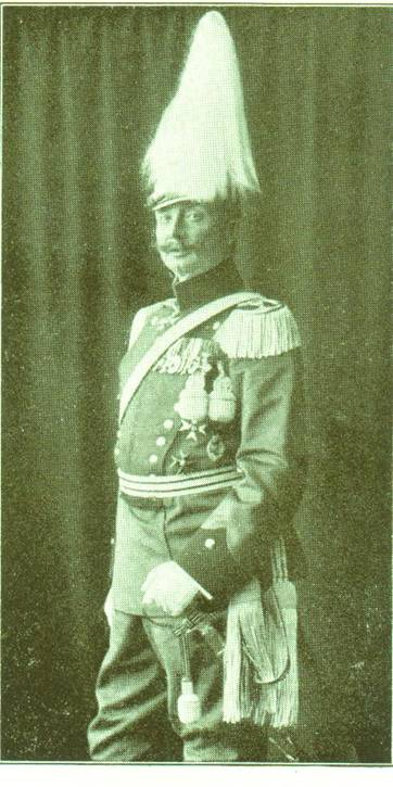 Eberhard Alfred Konrad Karl von Hofacker, 1908 - 1910 Kommandeur Ulanen-Regiment „König Wilhelm I.“ (2. Württembergisches) Nr. 20